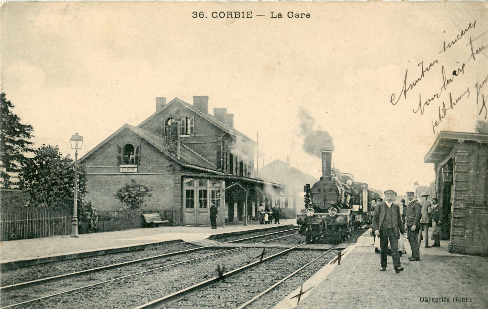 Carte postale ancienne éditée par Caron à Amiens, n°36 :CORBIE - La Gare